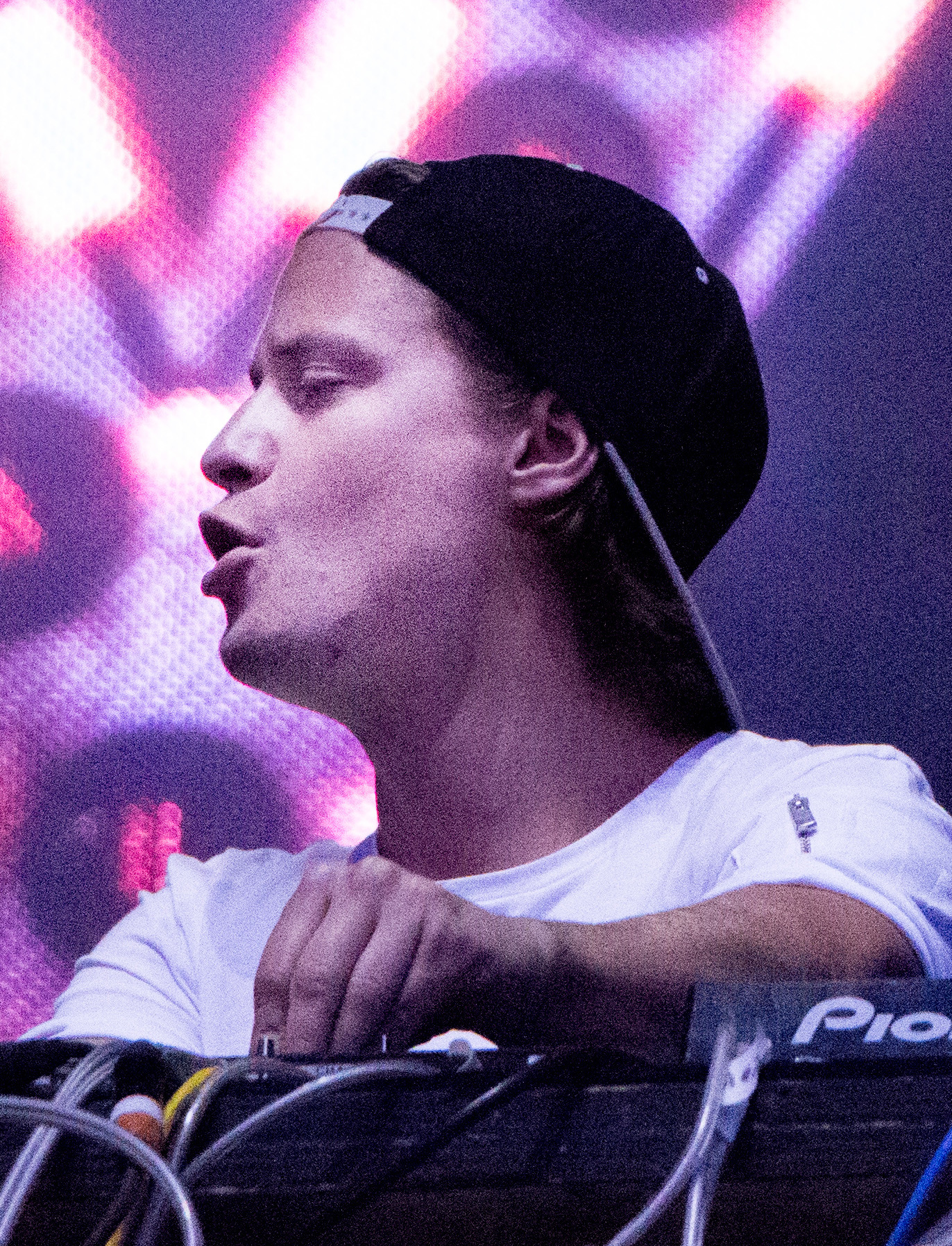 Kygo in VELD 2016